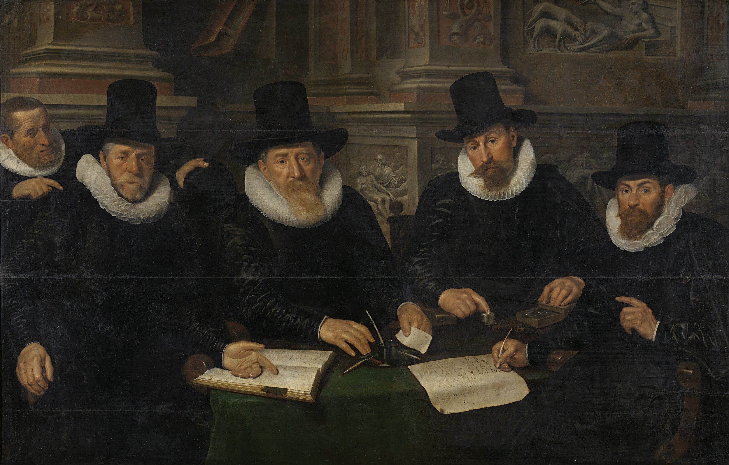 Groepsportret van de vier regenten en de binnenvader van het leprozenhuis te Amsterdam in 1624. De vier regenten zitten aan een tafel waarop een boek, documenten, een inktstel en een weegschaaltje staan. Geportretteerd zijn: Sieuwerd Sem, Hendrick van Bronckhorst, Ernst Roeters en Dirck Vlack. Op de achtergrond zijn episoden uit het verhaal van de arme Lazarus en de rijke man in reliëf afgebeeld.; Werner van den Valckert (ca. 1580–in of na 1627), olieverf op paneel, 1624